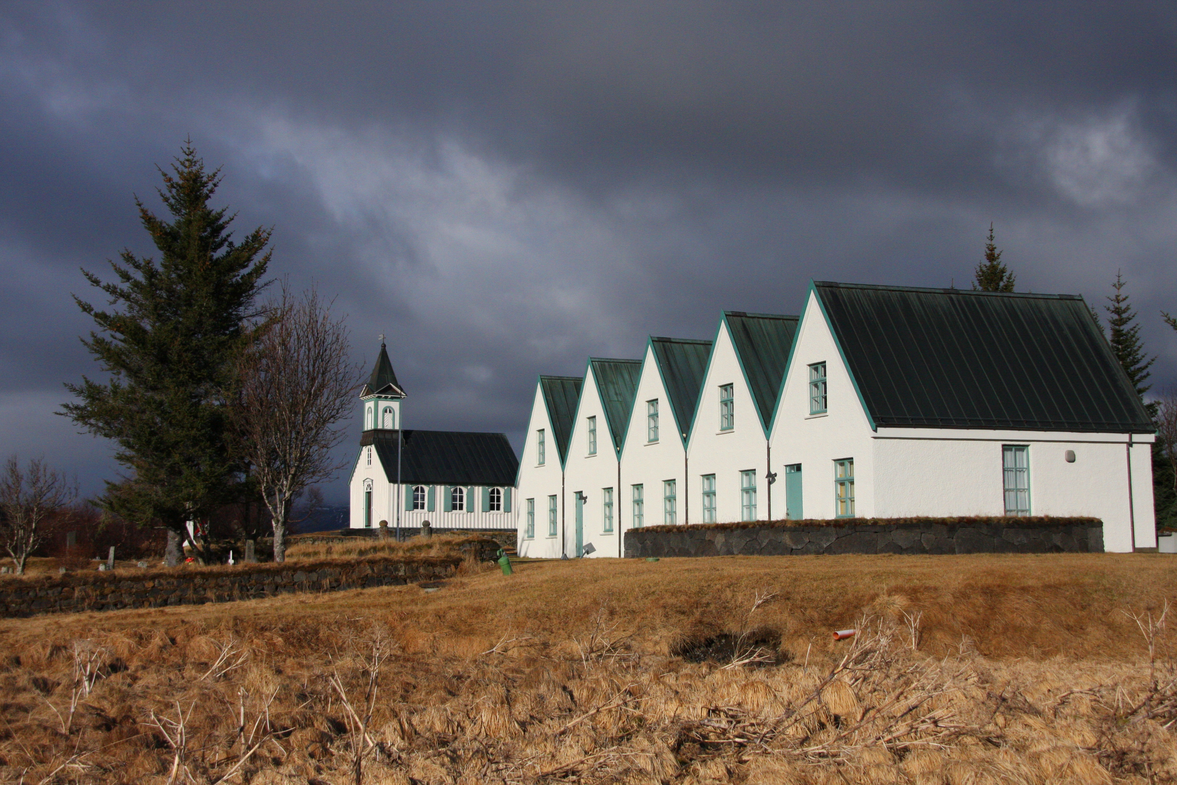 El Parque Nacional de Thingvellir Islandia. Fotografías tomadas en mi viaje con Tierras Polares del 27 de marzo al 2 de abril de 2013. Þingvellir ( pronunciación islandesa: [ˌ θiŋk vɛtlɪr̥] , cosa campos ) es un lugar en Bláskógabyggð en el suroeste de Islandia , cerca de la península de Reykjanes y la Hengill volcánica de la zona. Þingvellir es un lugar de importancia histórica, cultural y geológica y es uno de los destinos turísticos más populares en Islandia . Es el sitio de una fosa tectónica que marca la cresta de la Cordillera del Atlántico Medio . También es el hogar de Þingvallavatn , el lago natural más grande de Islandia. Parlamento o Alþingi se estableció en Þingvellir en 930 y permaneció allí hasta 1789. ElParque Nacional Þingvellir fue fundada en 1930 para proteger los restos del sitio parlamento y posteriormente se amplió para proteger a los fenómenos naturales en los alrededores. Parque Nacional de Þingvellir fue el primer parque nacional de Islandia y se decretó un "santuario nacional protegido para todos los islandeses, la propiedad perpetua de la nación islandesa bajo la preservación del Parlamento, para no ser vendidos o hipotecados". Fuente y más información : Web : Fotografías : Mi Blog de Islandia : .es/ Ver el video